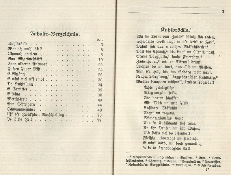 Inhaltsverzeichnis und erste Textseite von Gustav Nötzolds (verstorben 1939) 9-bändiger (westerzgebirgischer) Mundartreihe über die Bergarbeiter im Zwickauer Steinkohlerevier mit dem Text/Gedicht, dass der Heftreihe ihren Namen gab.